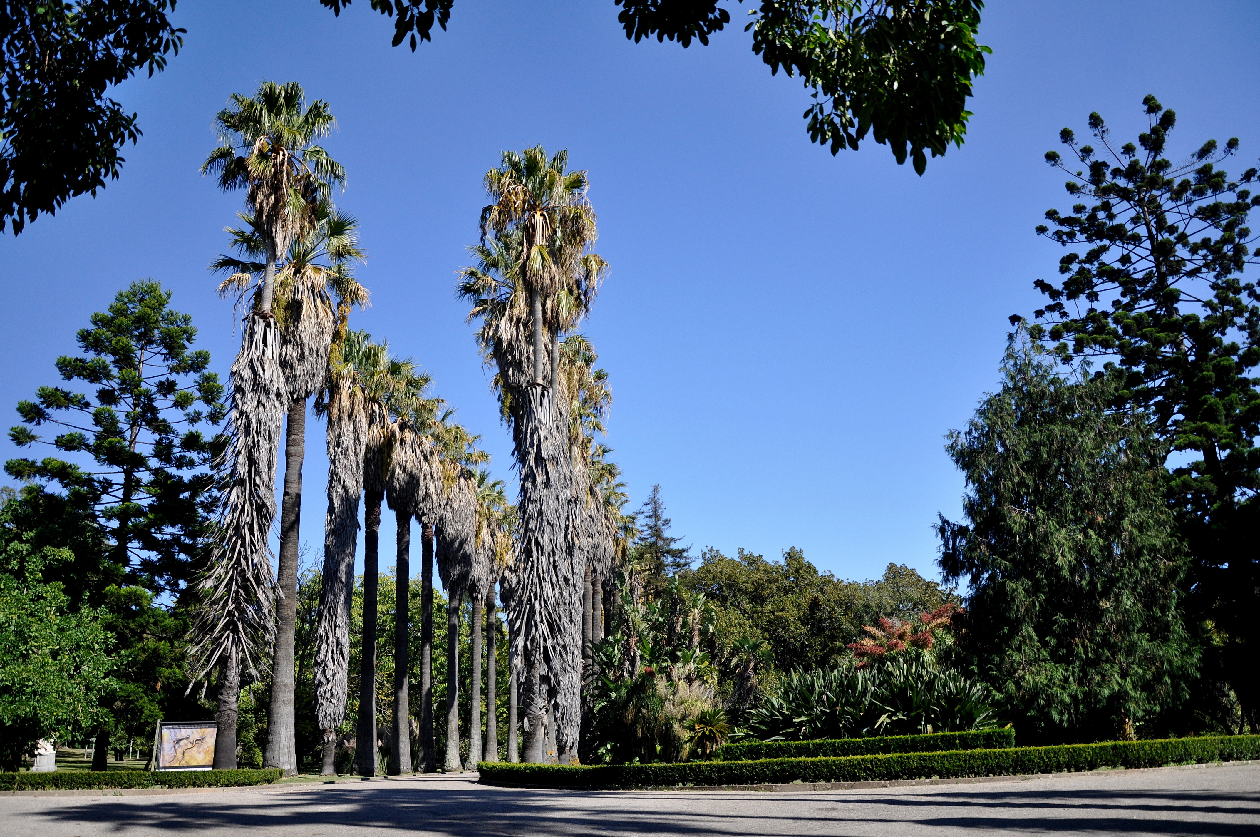 Washingtonia filifera in de Jardim Botânico Tropical te Santa Maria de Belém, Portugal